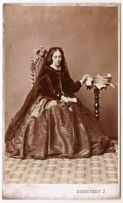 Batthyány Lajosné (Zichy Antónia) grófné portréja. Schrecker Ignác felvétele (1864) Hungarian National Museum Native nameMagyar Nemzeti MúzeumLocationBudapest, HungaryCoordinates47° 29′ 28″ N, 19° 03′ 46″ E Established1802WebsiteHungarian National Museum